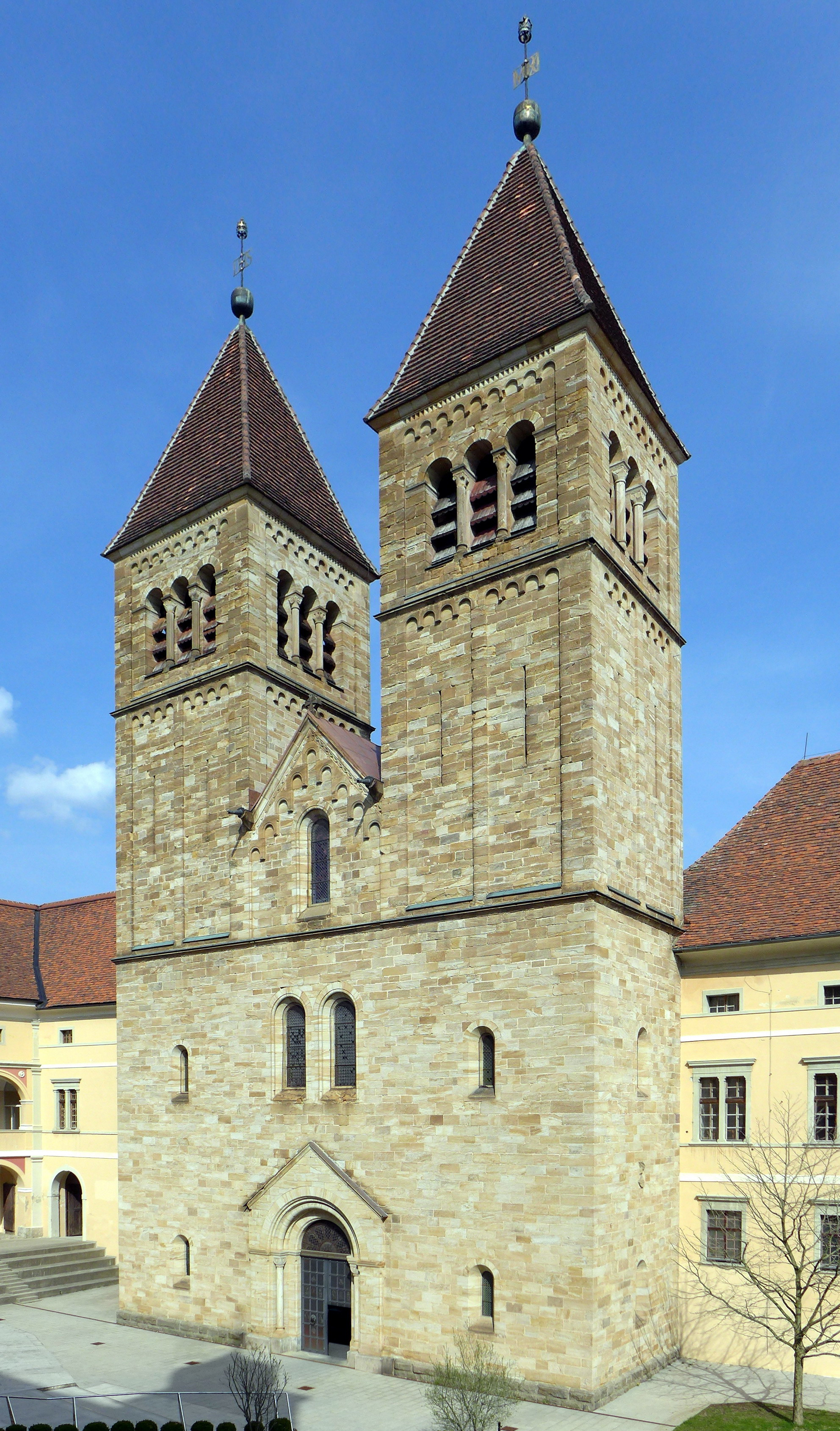 Benediktinerabtei Seckau, Türme der Basilika